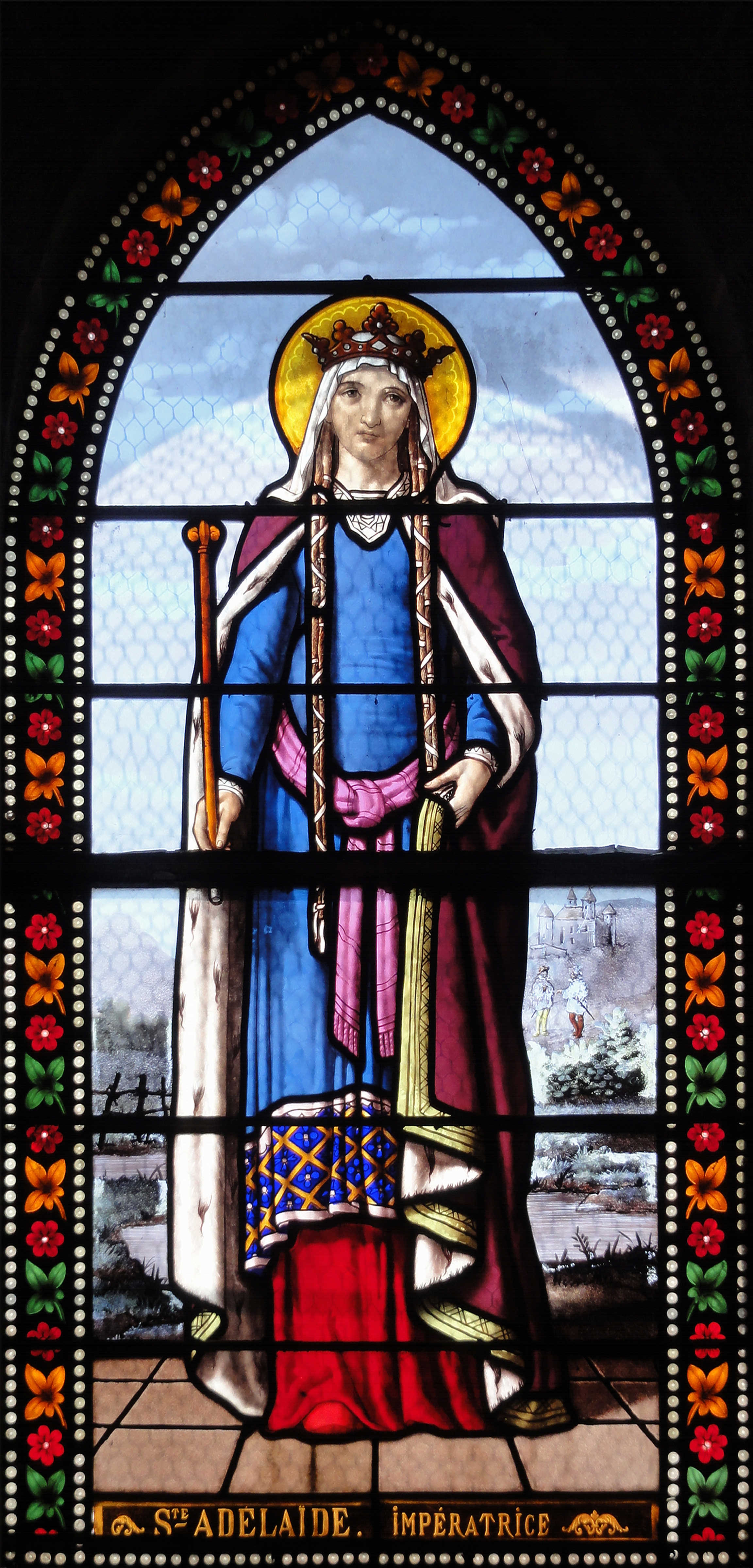 Saint-Adélaïde impératrice sur un vitrail par Lorin, dans l'Église de Toury.